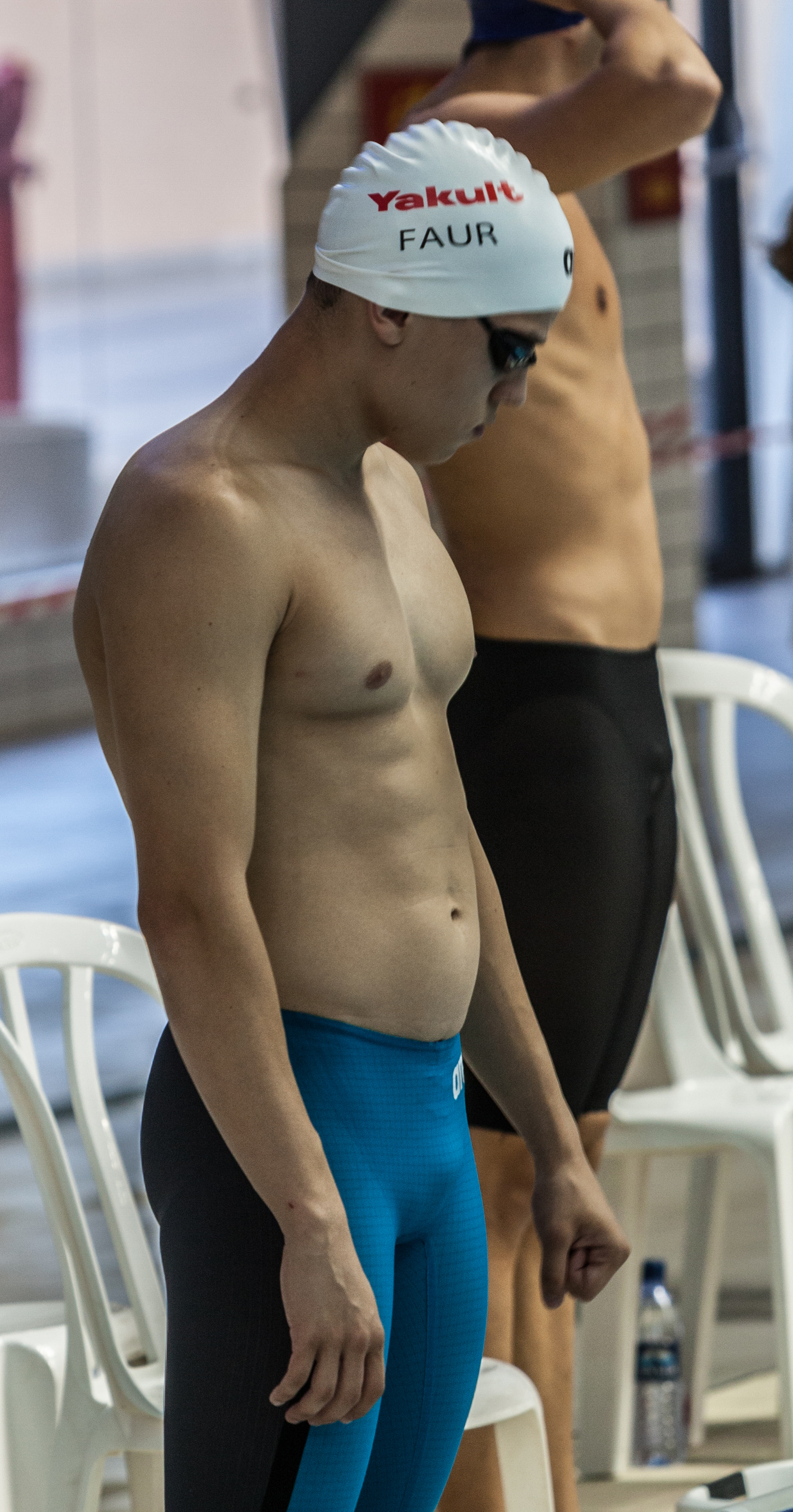 רונן פאור, אליפות ישראל בשחייה 2015